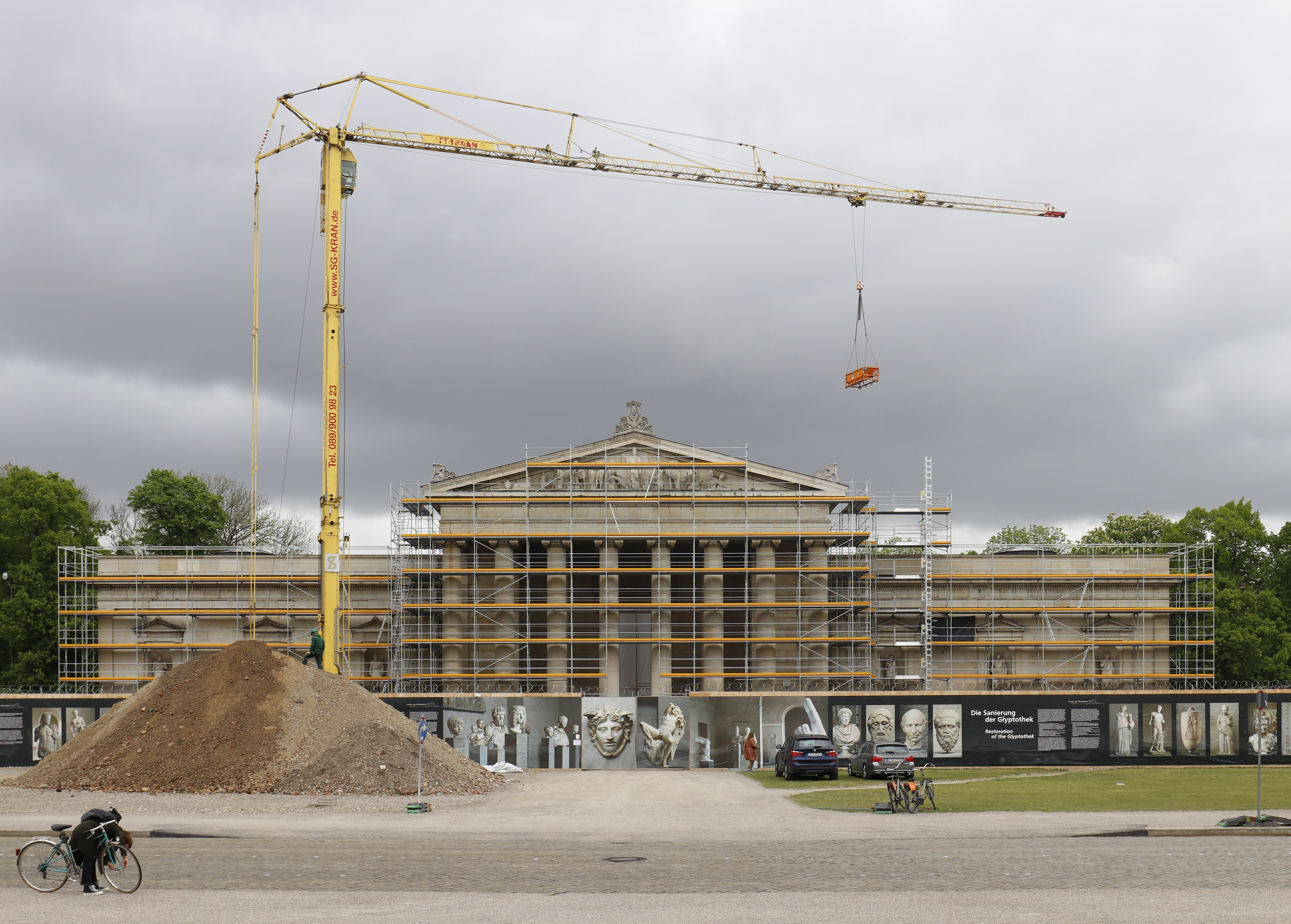 Die Glypotothek in München wird 2019 generalsaniert